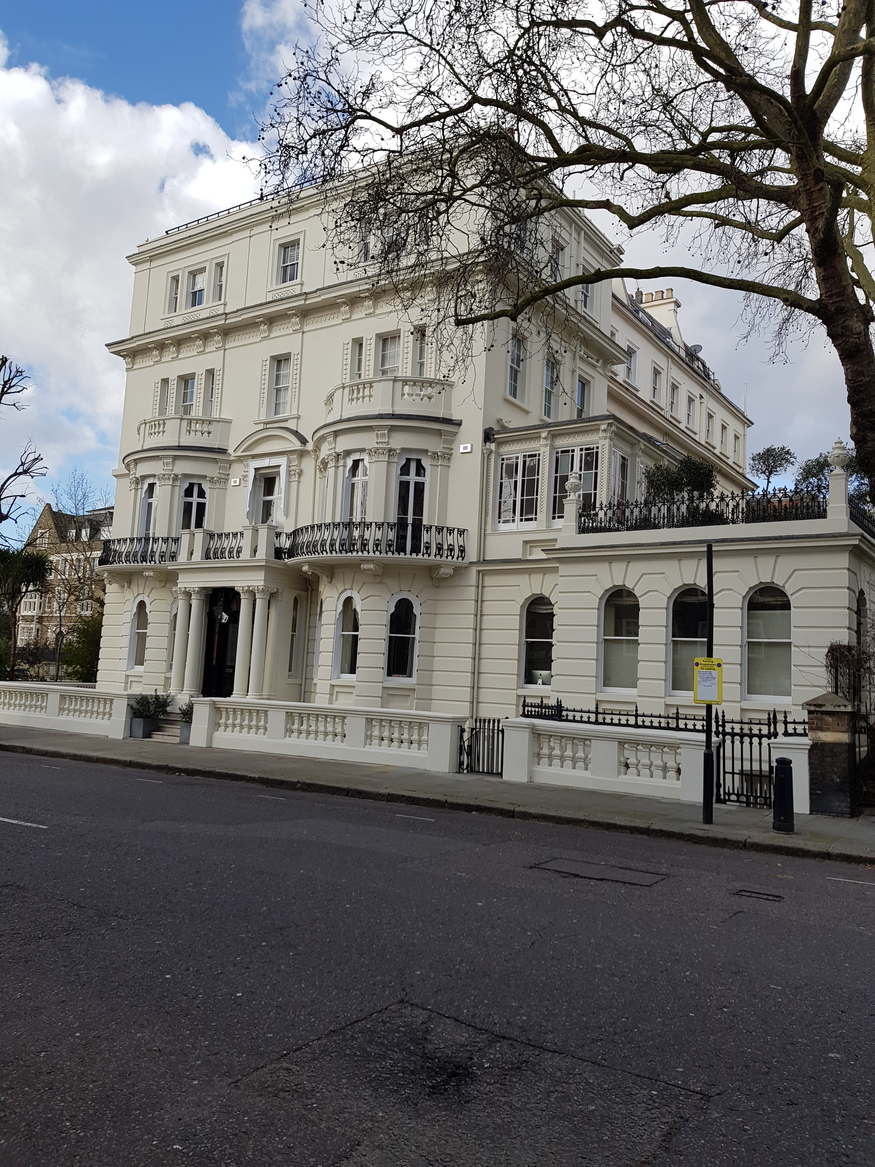 Maison à l'angle de Ladbroke Grove et de Kensington Park Gardens, Notting Hill, Londres.